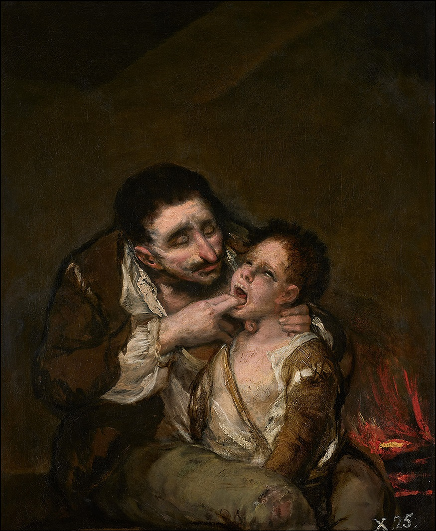 El lazarillo de Tormes (antes llamado "El garrotillo").